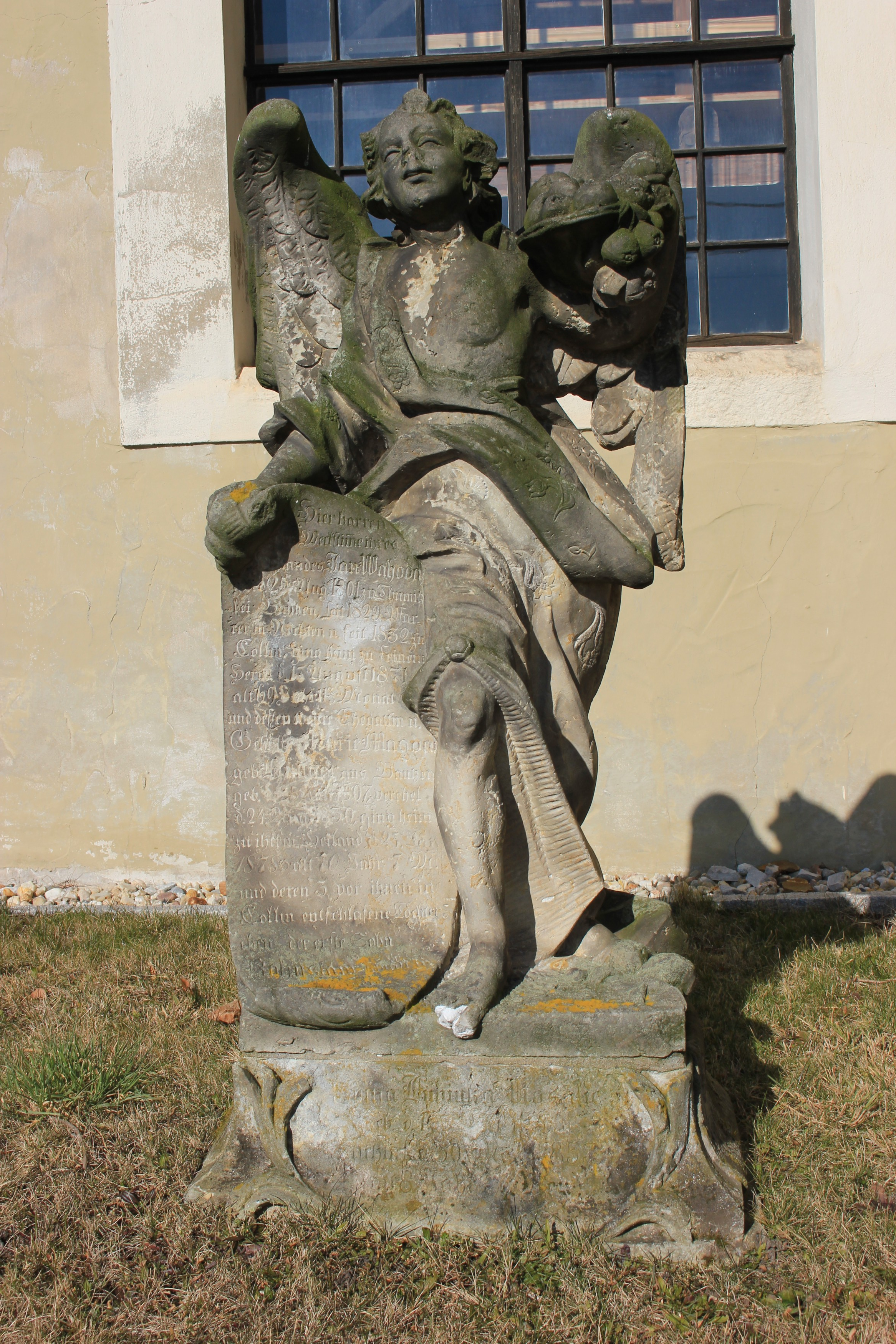 Hornjoserbsce: Narowny pomnik fararja Jana Łahody při Chołmjanskej cyrkwi.